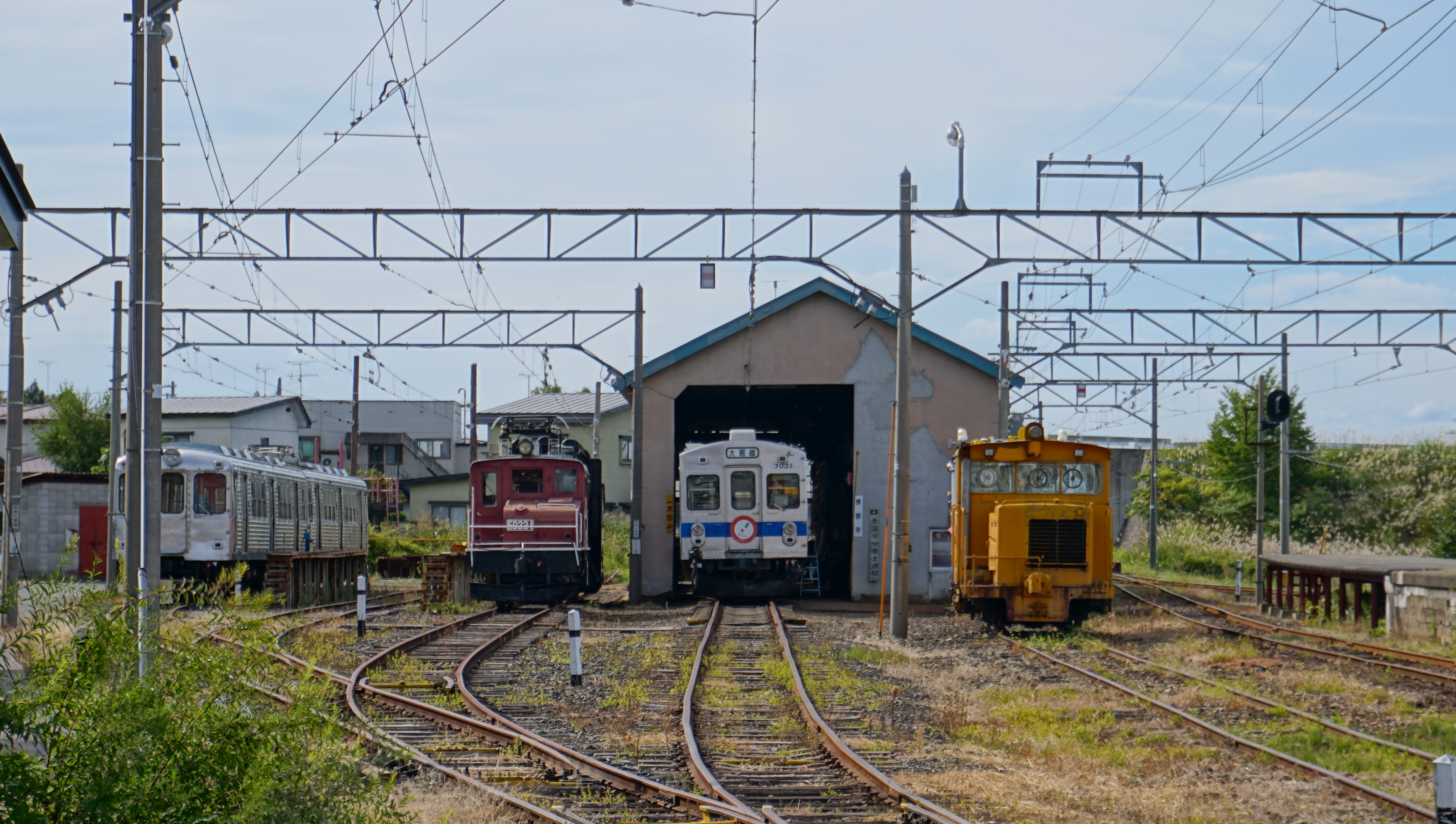 津軽大沢駅に付属する車両検修所